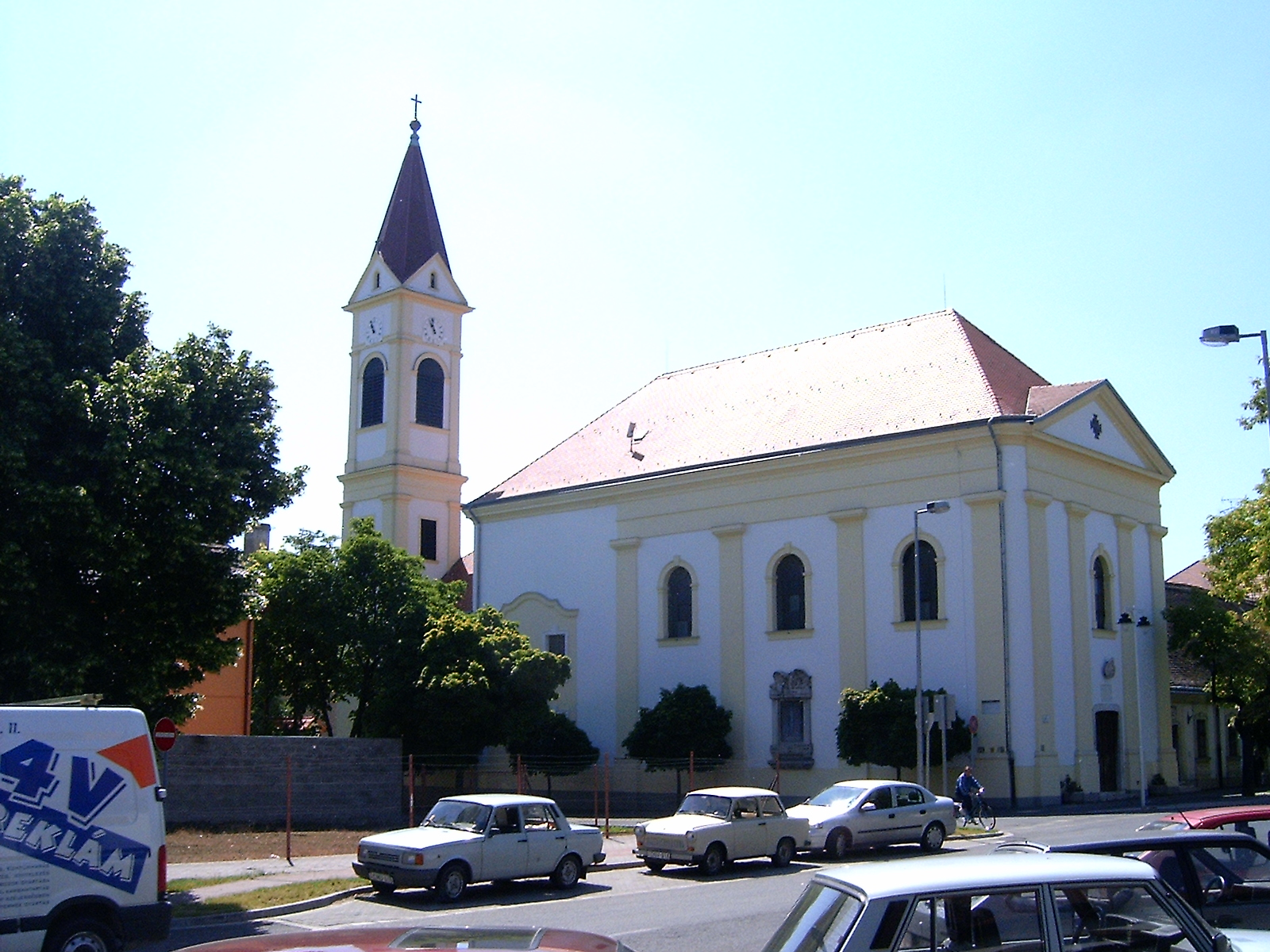 A győri kamillánus templom